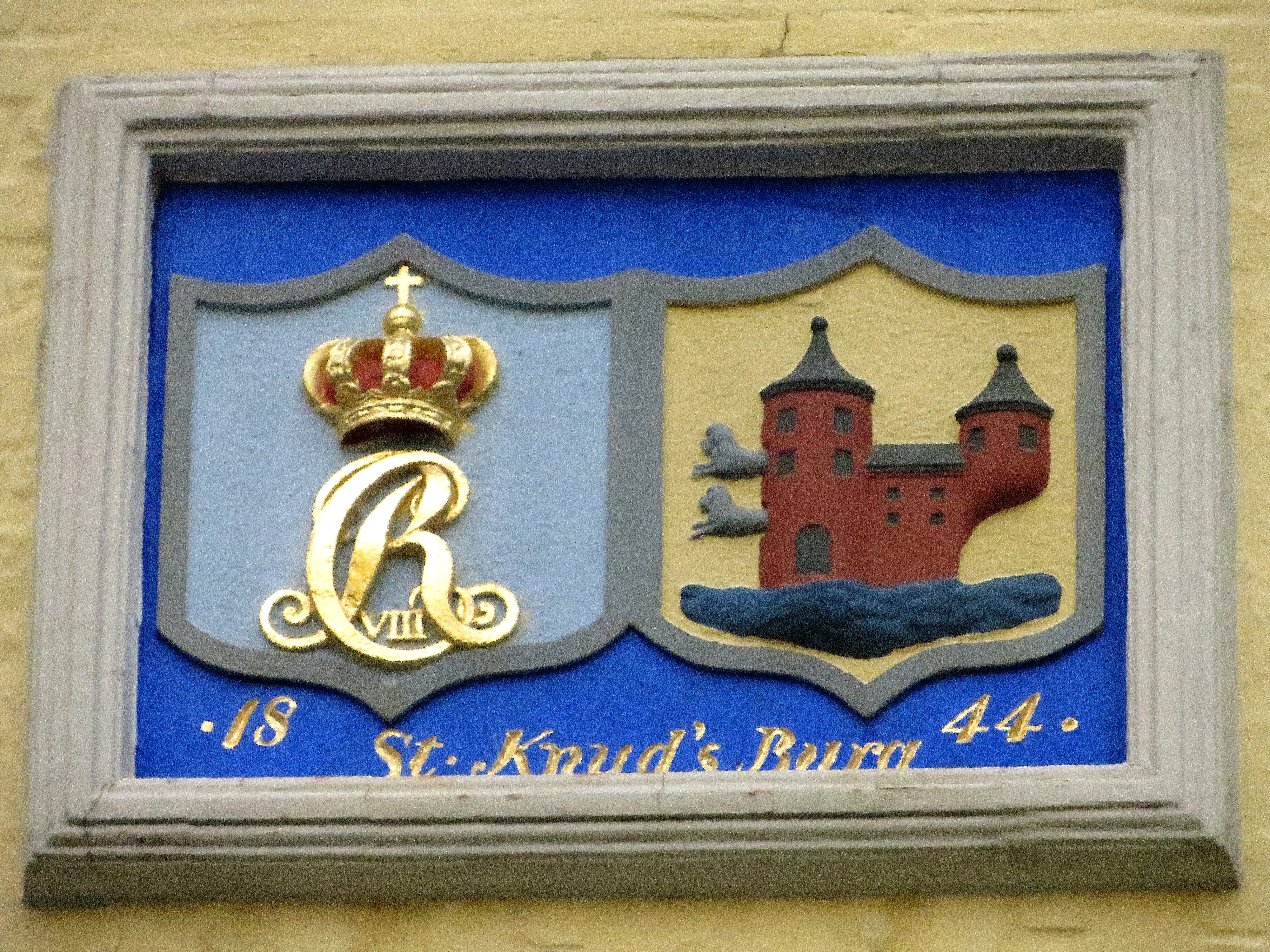 Die Tafel am Restaurant St. Knudsborg, Flensburg; mit Schriftzug St. Knud's Burg 1844 und Flensburgwappen